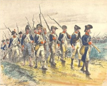 L'armée de Sambre-et-Meuse, 1795.